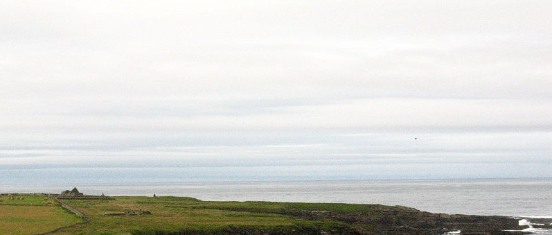 Le site du broch de Crosskirk et de la chapelle Sainte-Marie et ses environs.